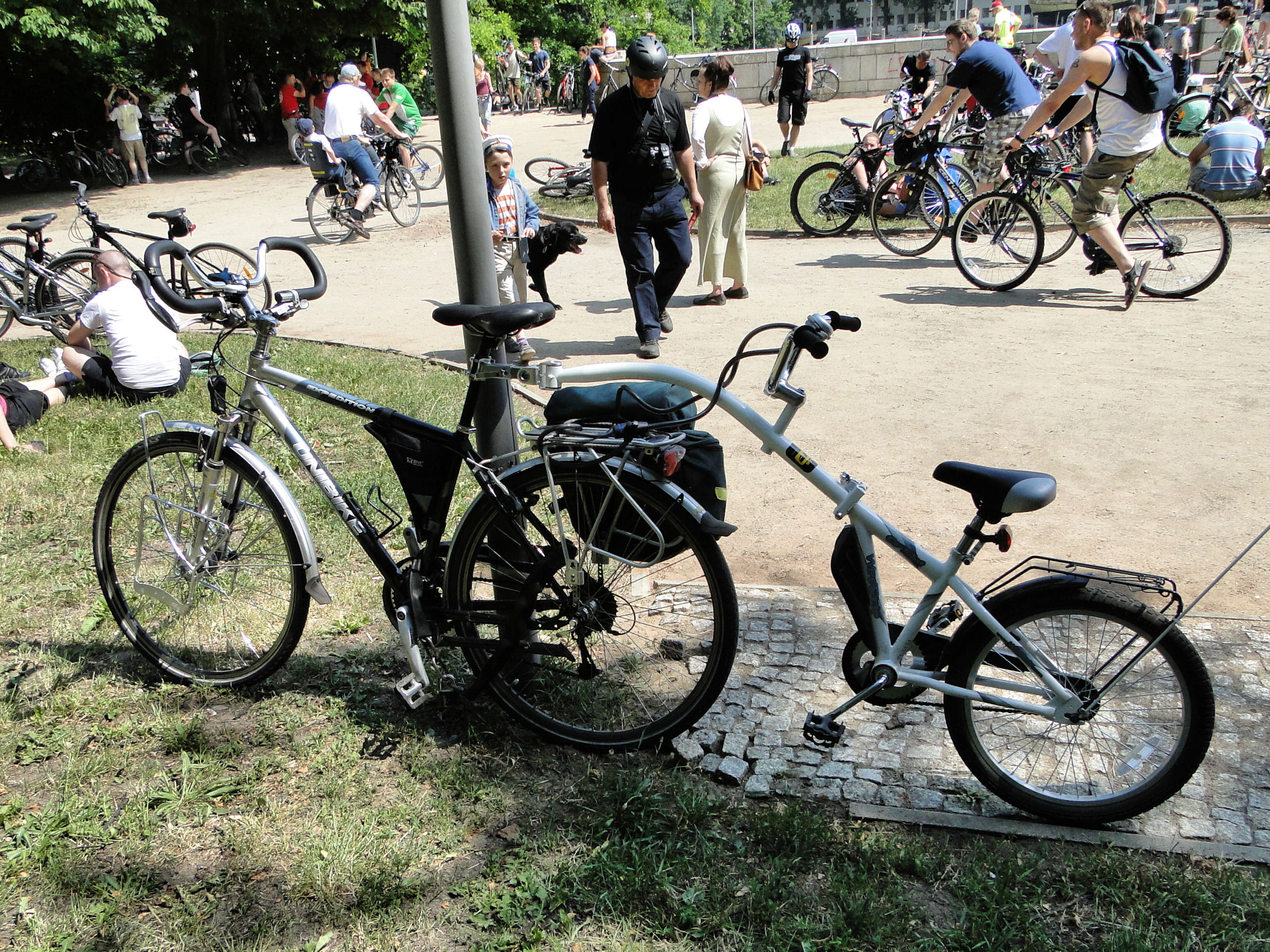 Rower Unibike Expedition GTS z przyczepką tandemową.